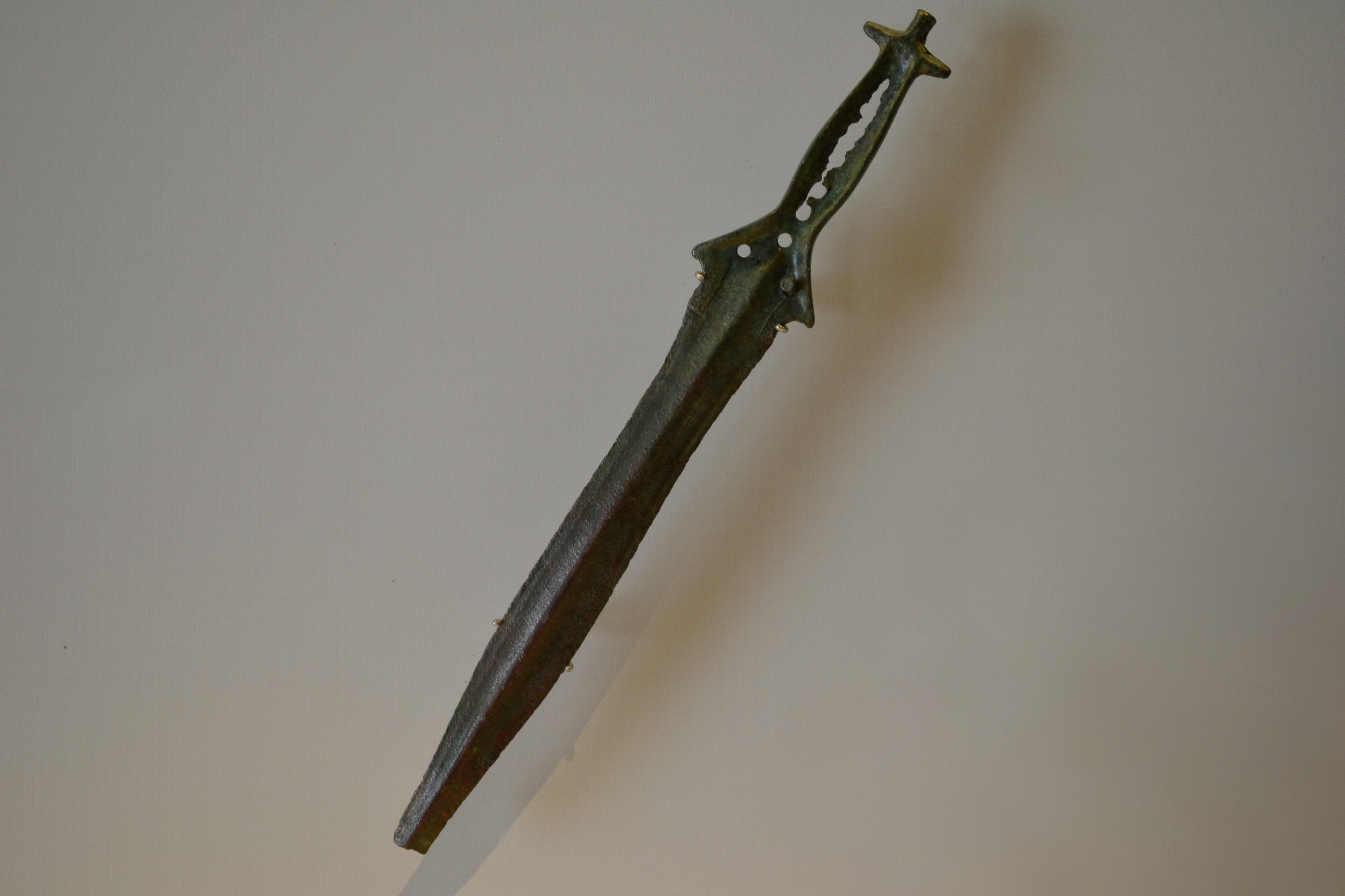 Espada corta terminada en "lengua de carpa" con hoja de tendencia pistiliforme, marcado nervio central, filos muy desgastados y pátina de color verde oscuro. La empuñadura, calada y con pomo ovalado, está rematada en botón cilíndrico. Presenta tres orificios para remaches en la lengüeta y uno más a cada lado de la guarda, en uno de los cuales se conserva el remache. En los flancos de la lengüeta y en la hoja, a la altura de los recazos, se observan restos de una decoración puntillada. Pieza casi completa a la que solo falta la punta. Bronce Final. 1150-850 a. C. Procedencia: Paredes de Nava (Palencia). Longitud: 34,50 cm; anchura: 4,90 cm; grosor: 1 cm; peso: 266 g. Nº inv. 10219. Museo Arqueológico Nacional de España.